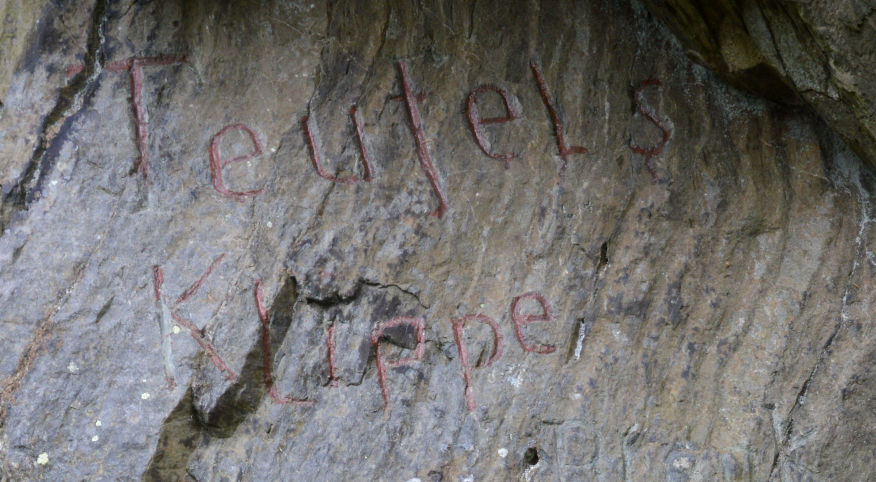 Teufelsklippe